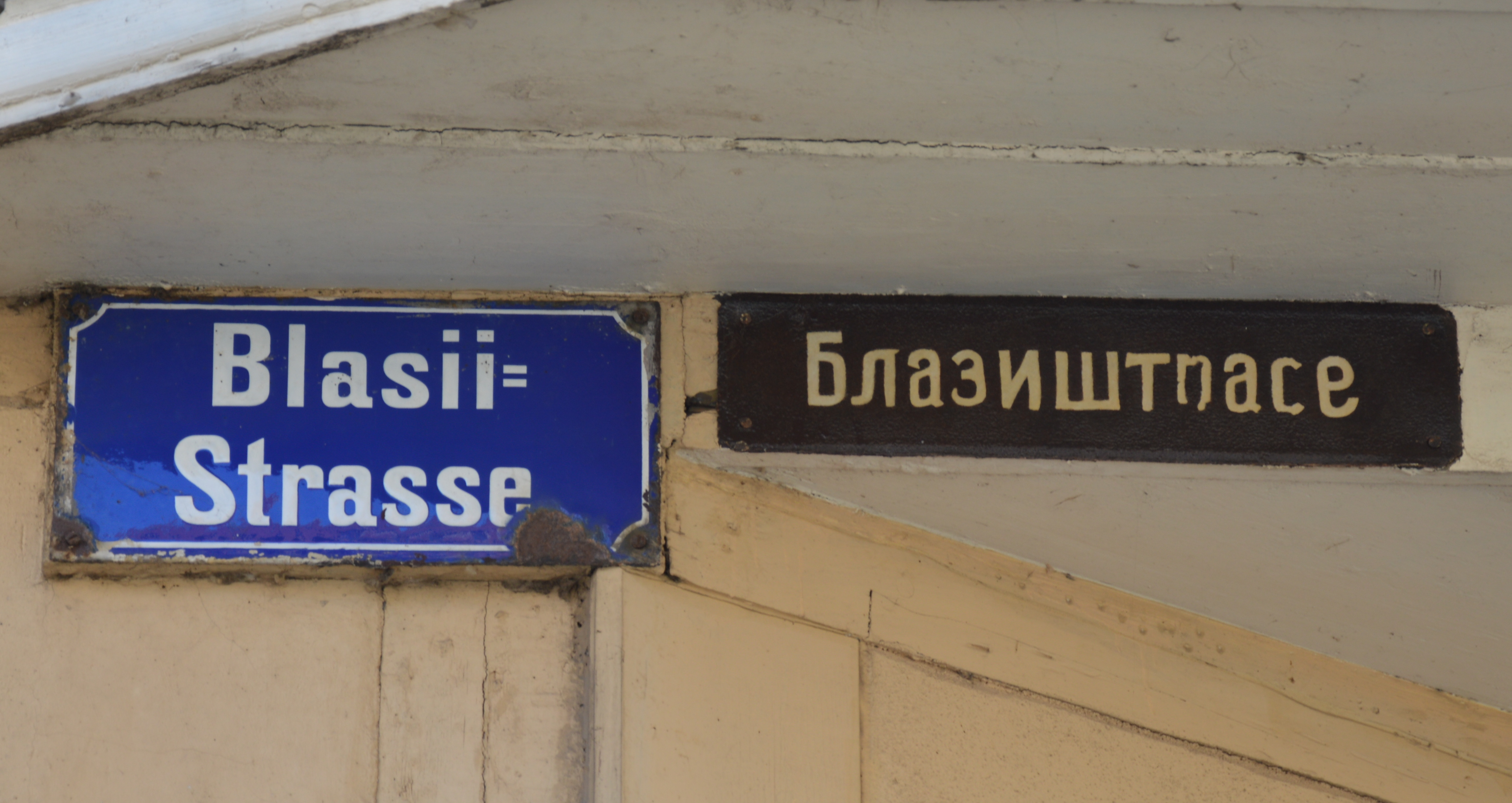 kyrillischer Schriftzug in der Blasiistraße in Quedlinburg